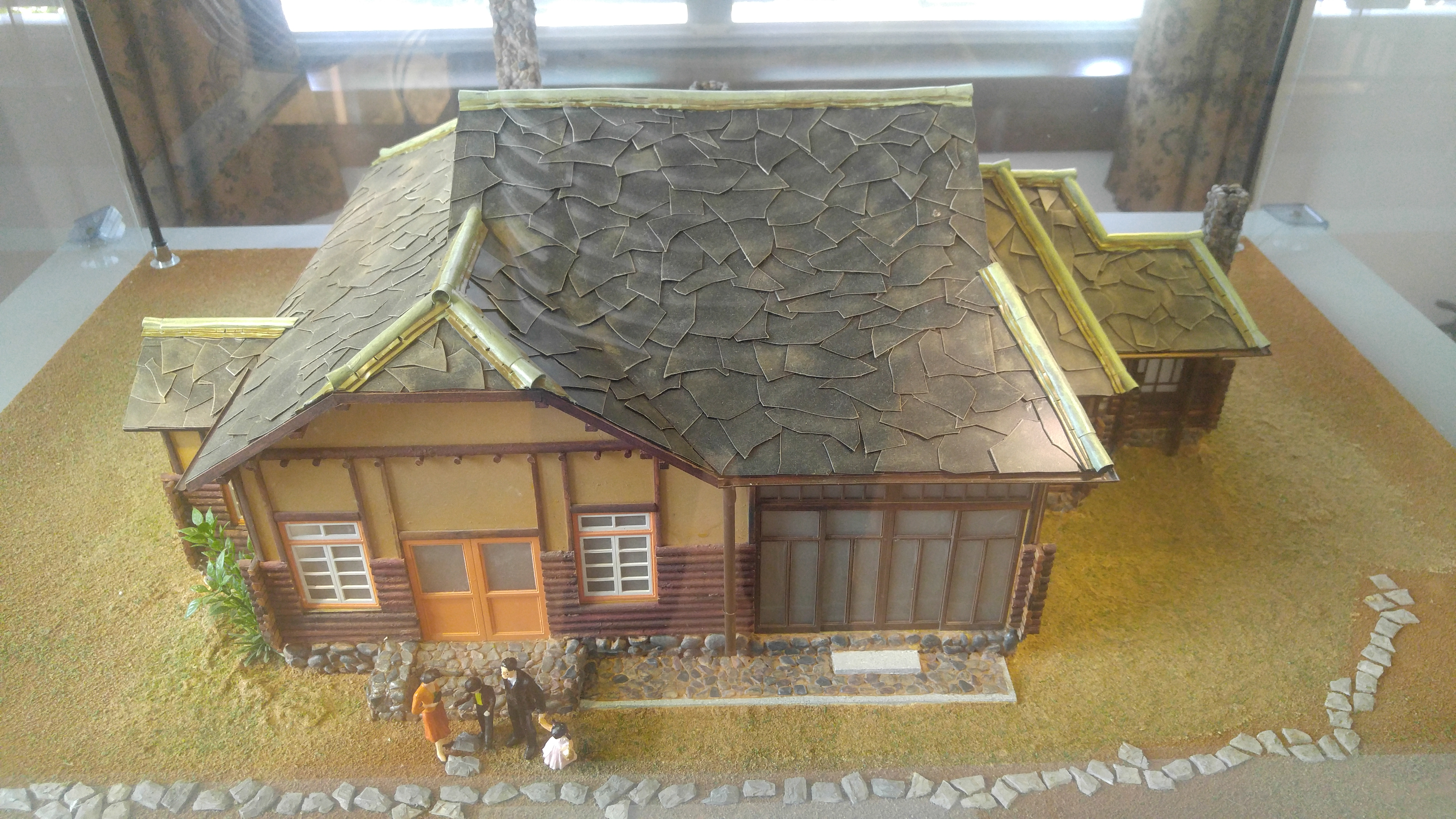 이영춘 가옥 모형